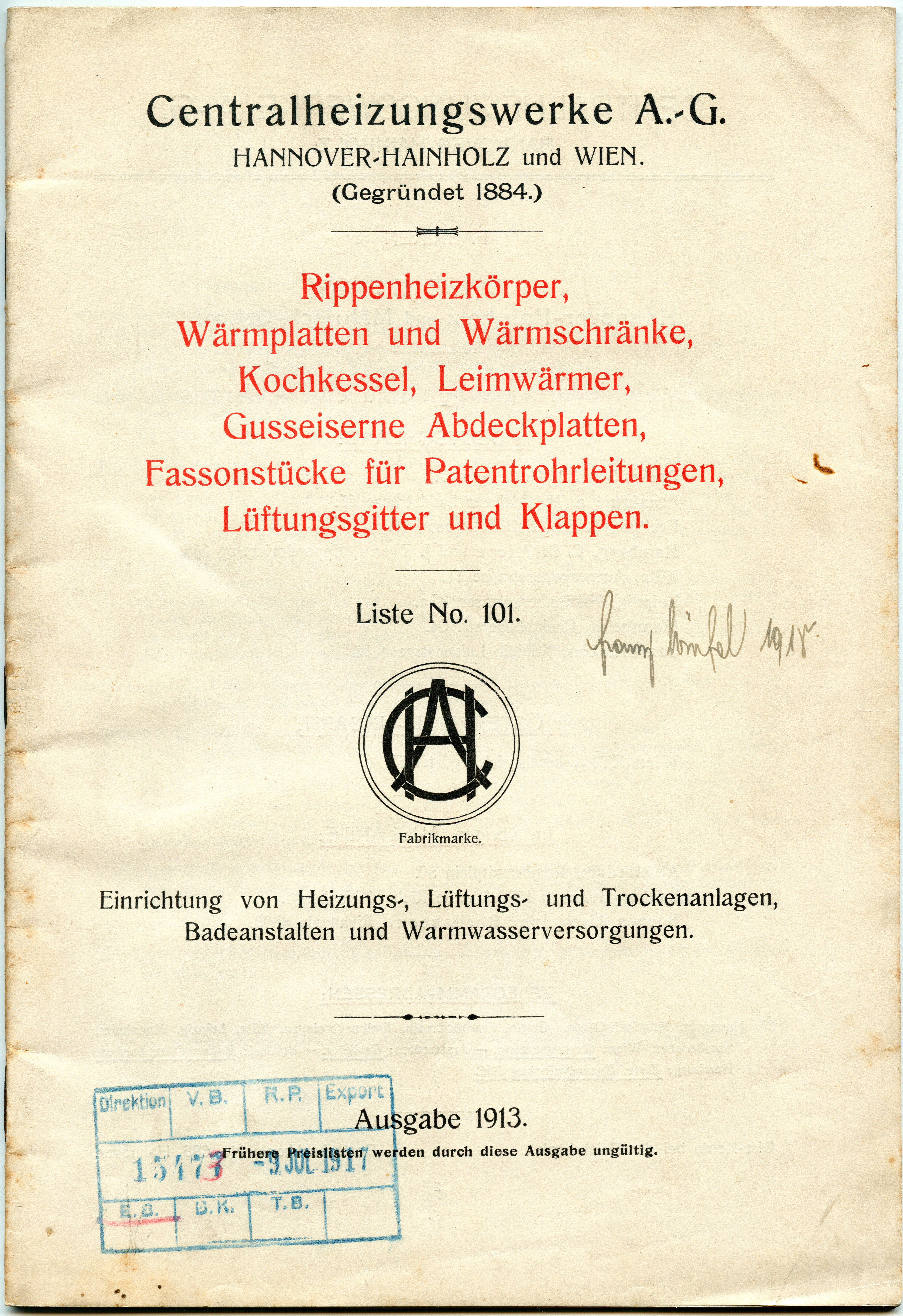 Titelblatt (Seite 1) des Kataloges ("Liste 101") von 1913 der Centralheizungswerke AG mit Sitz in Hannover-Hainholz und Wien ...